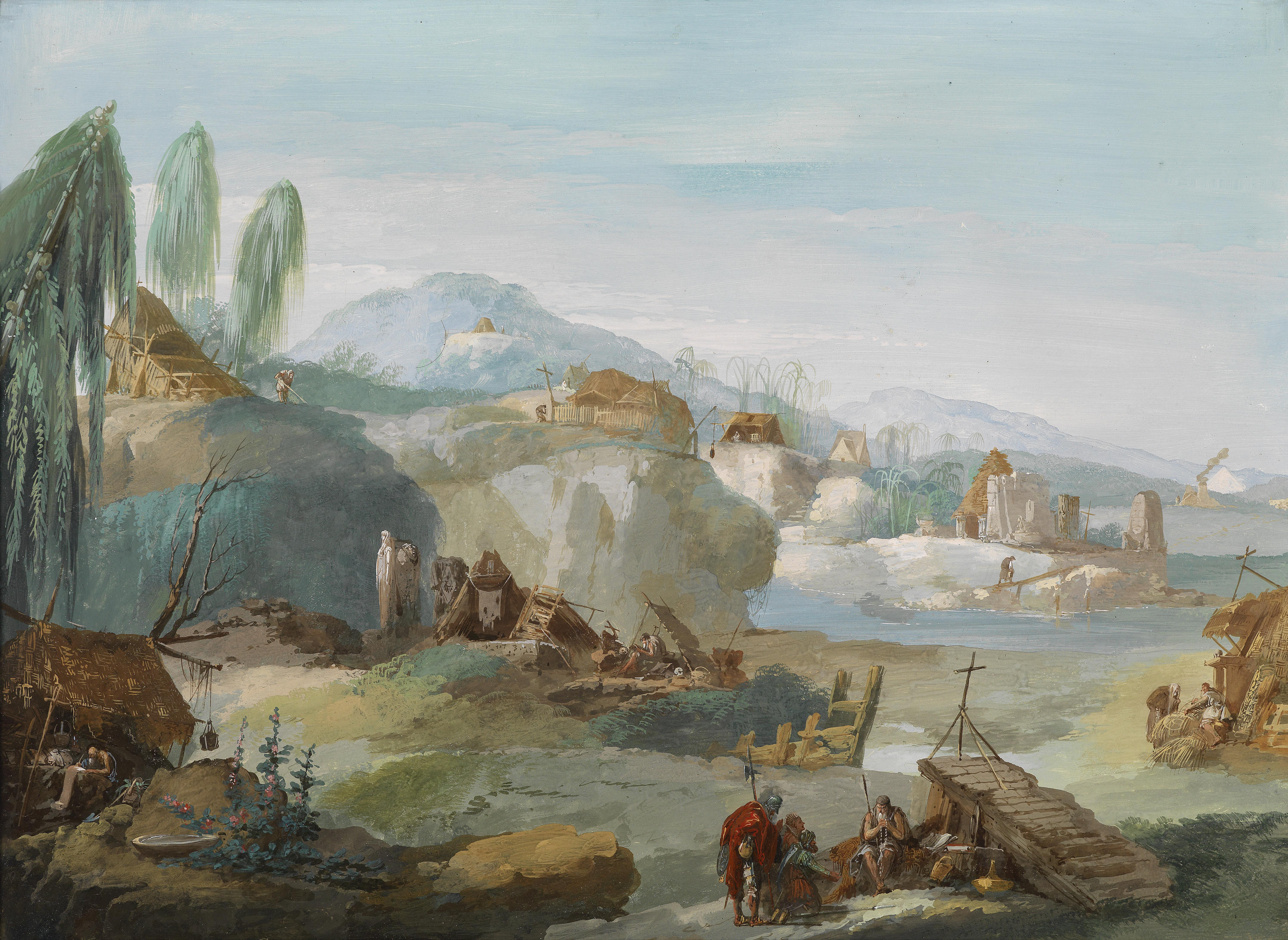 La Tebaide